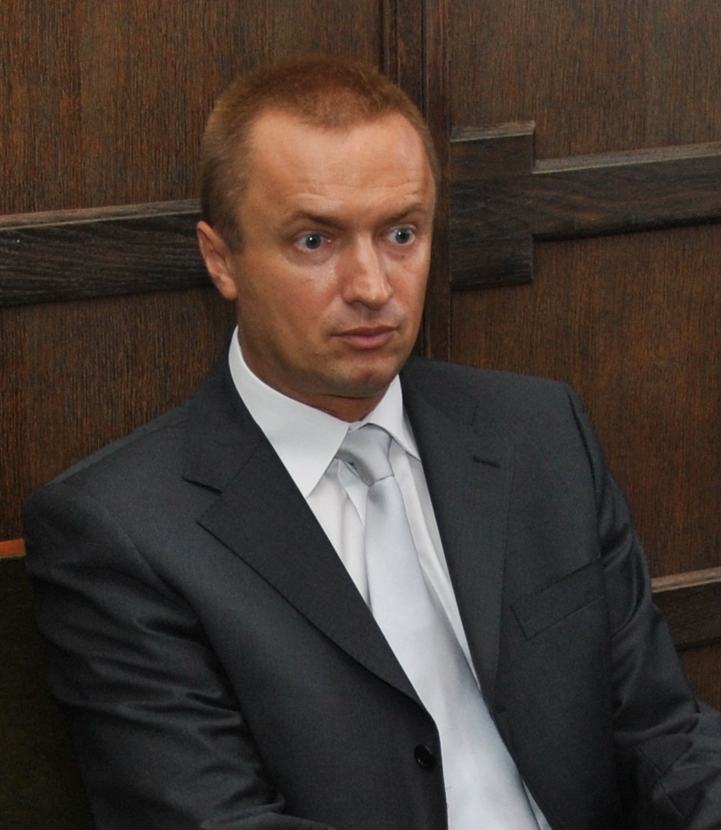 Bojan Pajtić